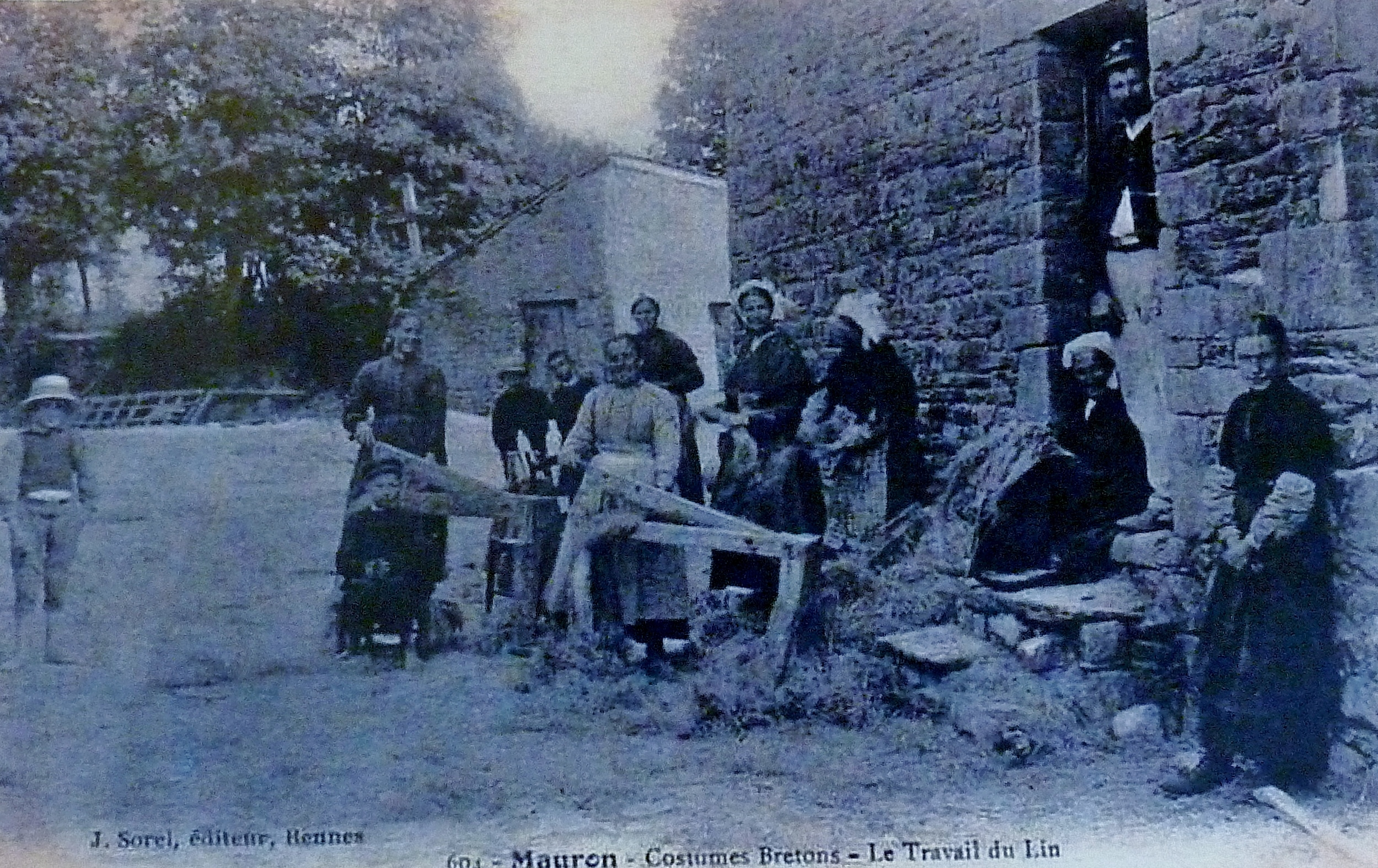 Mauron : le travail du lin (carte postale J. Sorel, début XXe siècle).